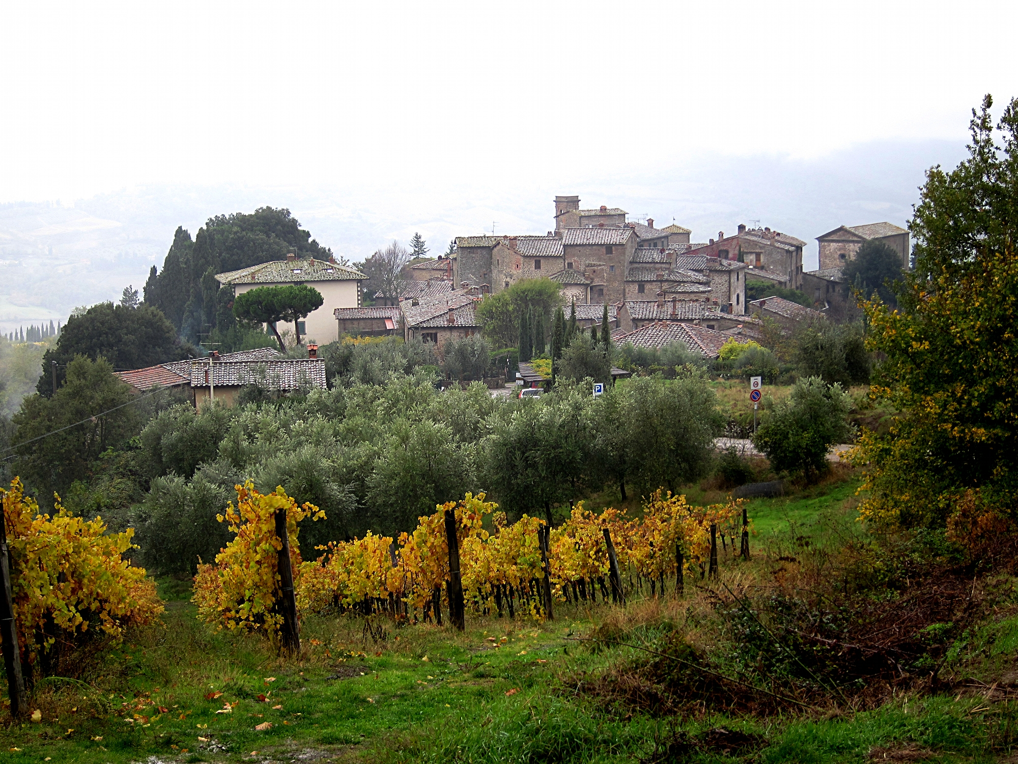 Vue de Volpaia dans la commune de Radda in Chianti.